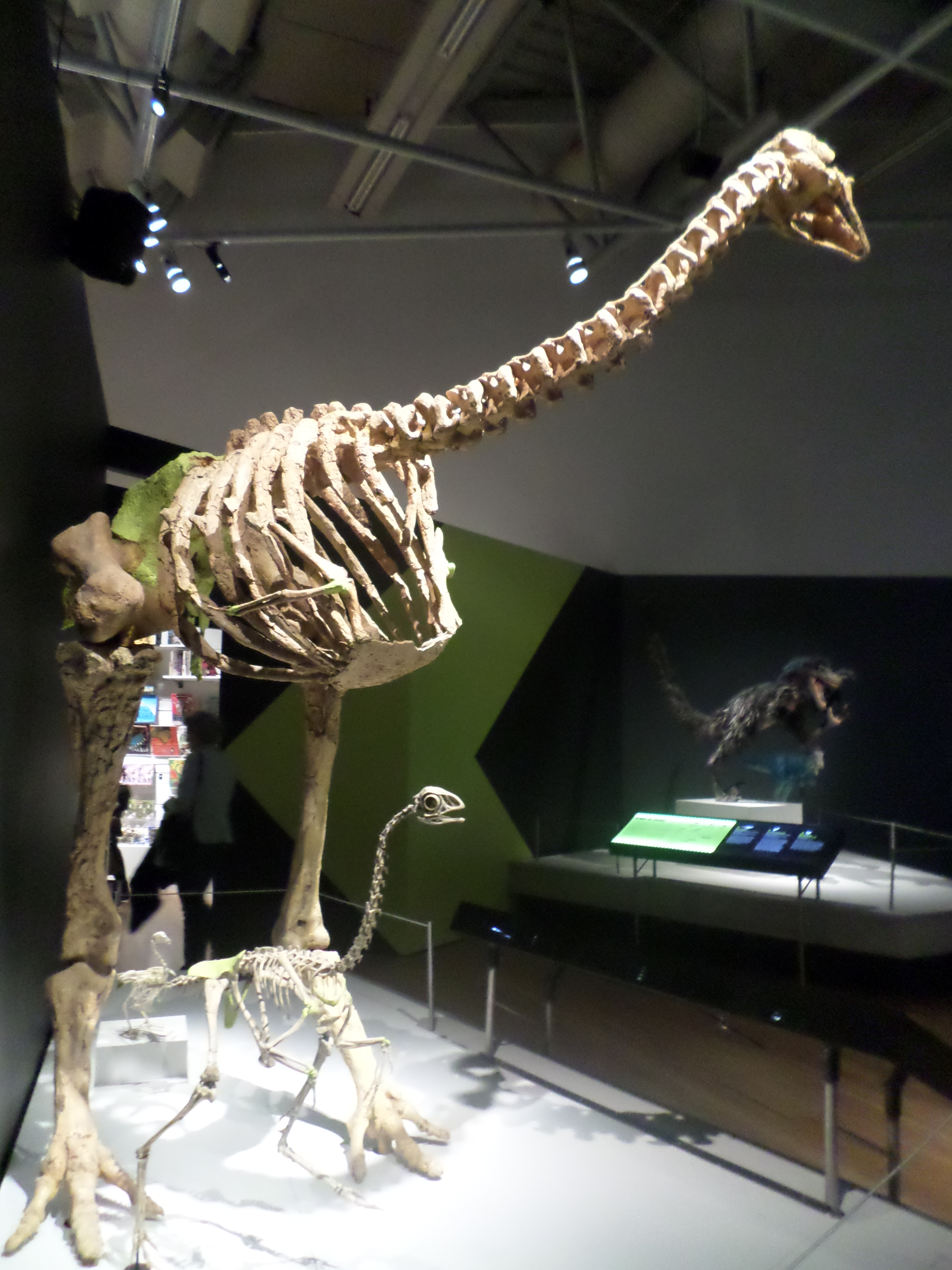 SAMSUNG CAMERA PICTURES